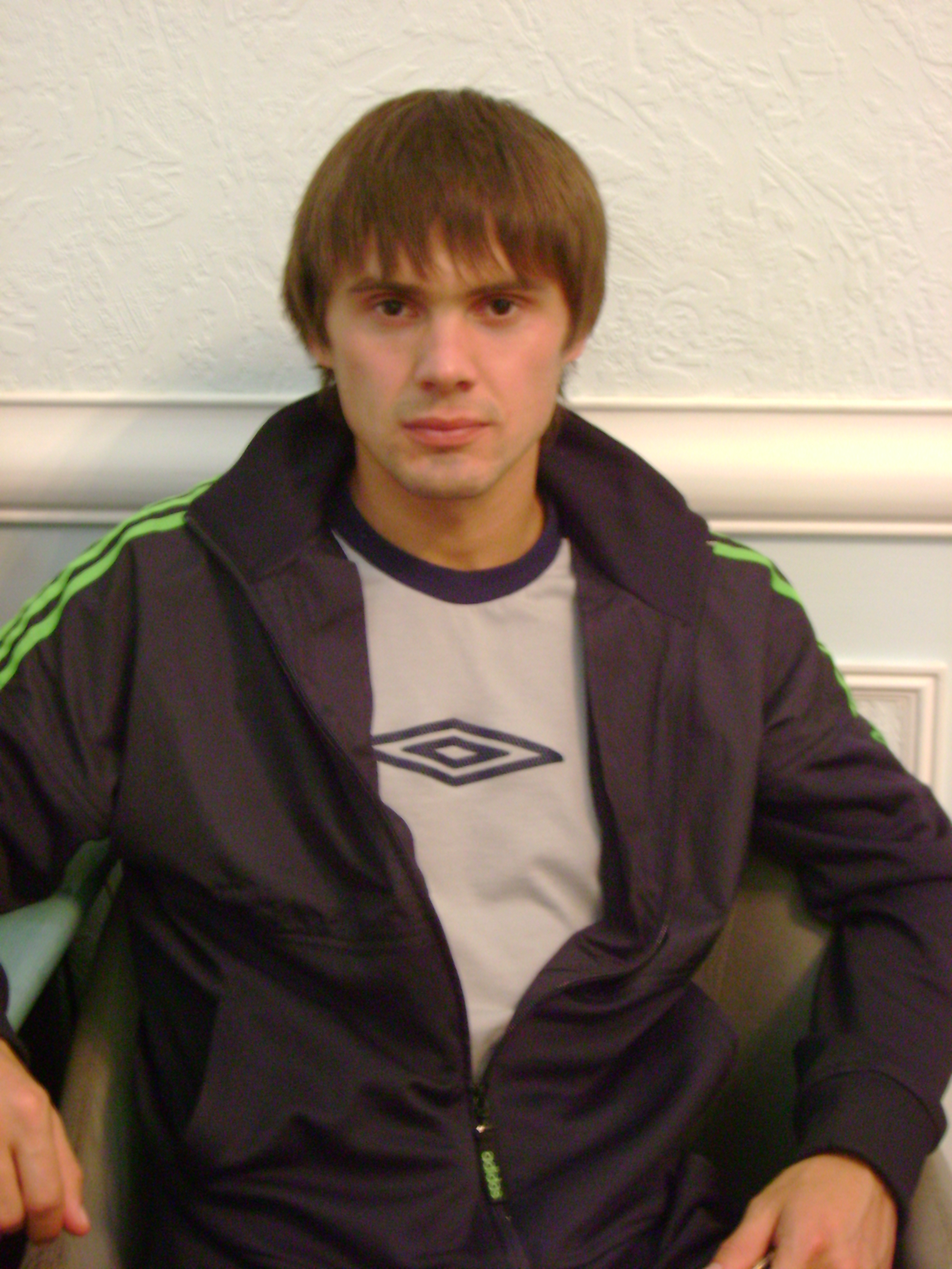 Александр Чертоганов